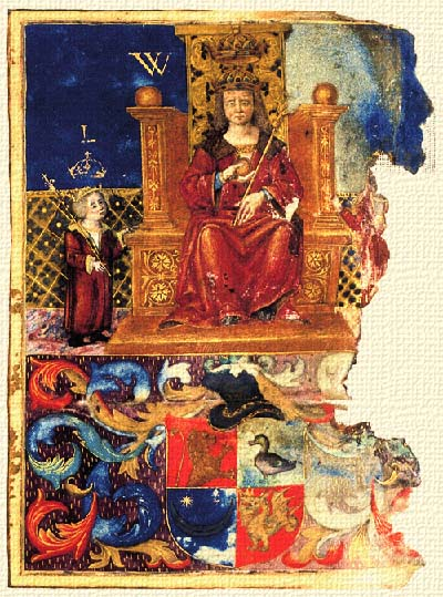 Gersei Pethő János II. Ulászló által 1497-ben kibővített címere